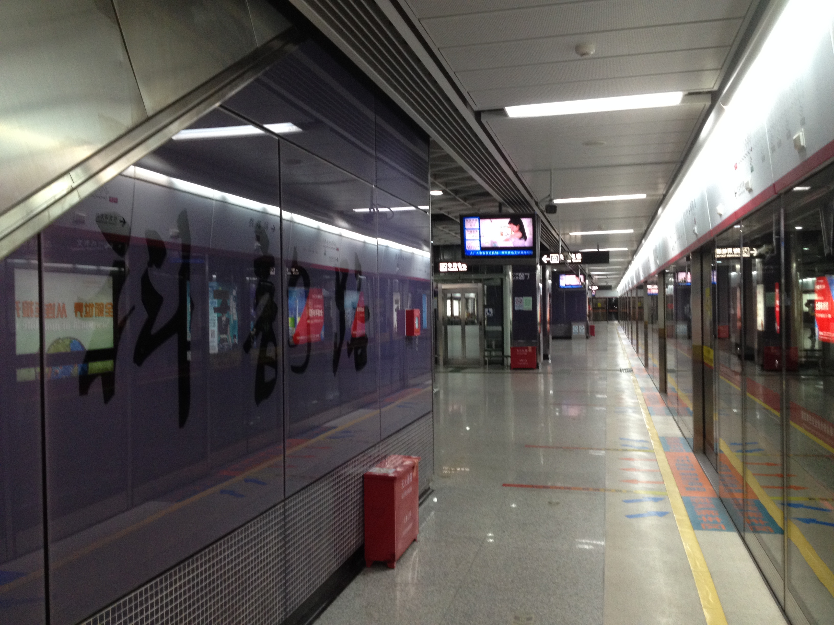 广州地铁科韵路站月台